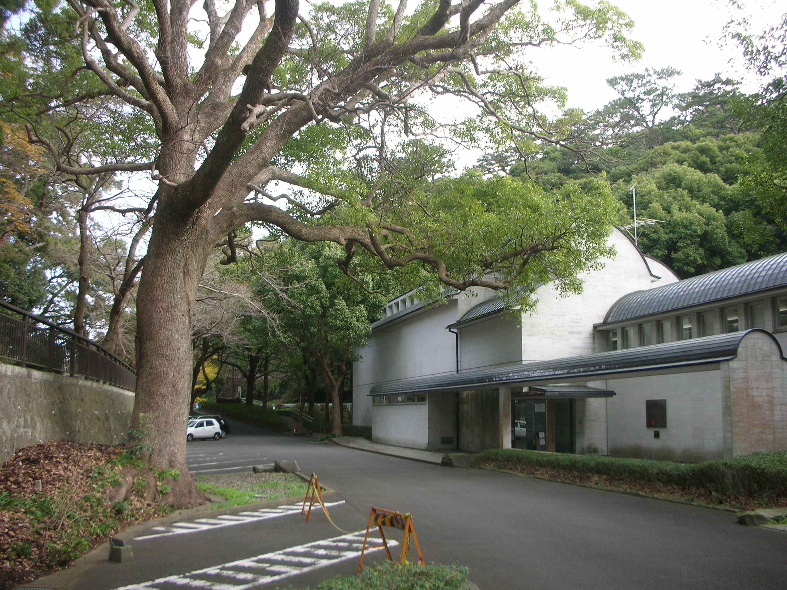 中川一政美術館